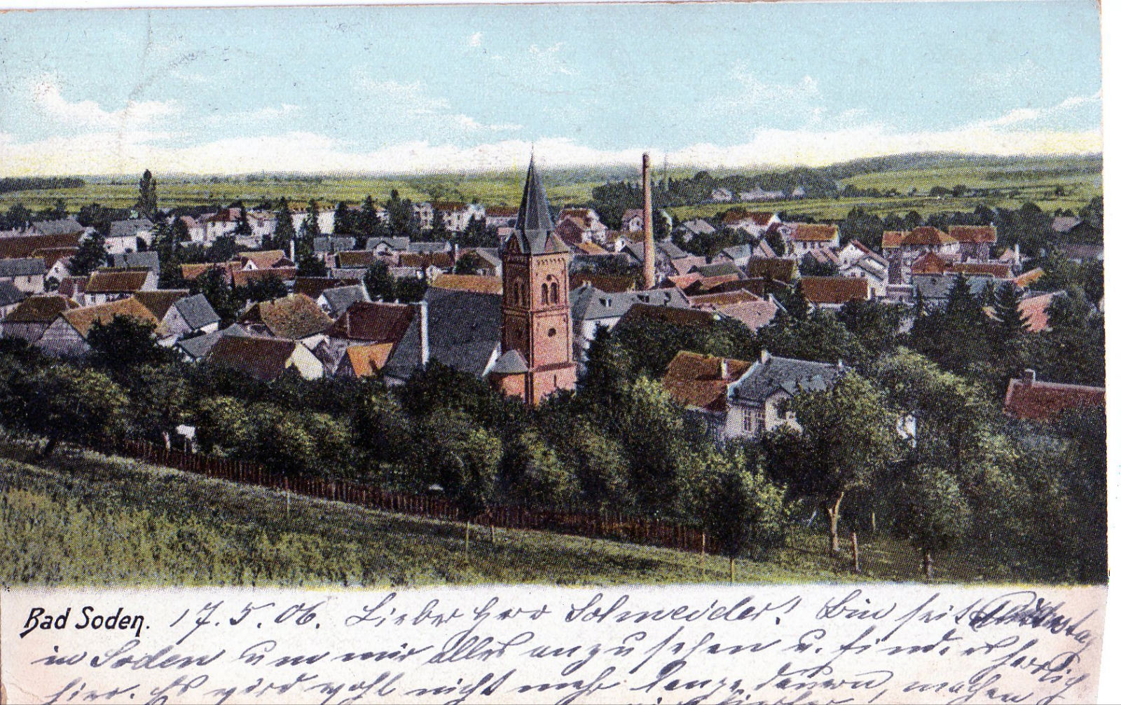 Übersicht von Bad Soden am Taunus, mit ev. Kirche im Vordergrund